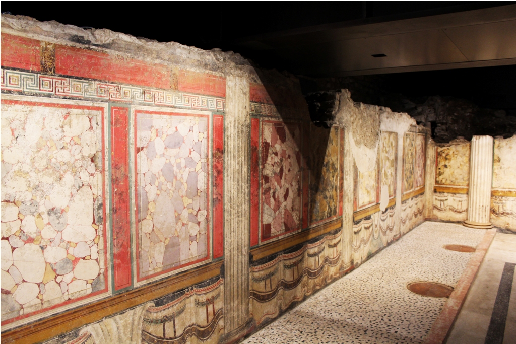 Quarta cella - Capitolium - Brescia